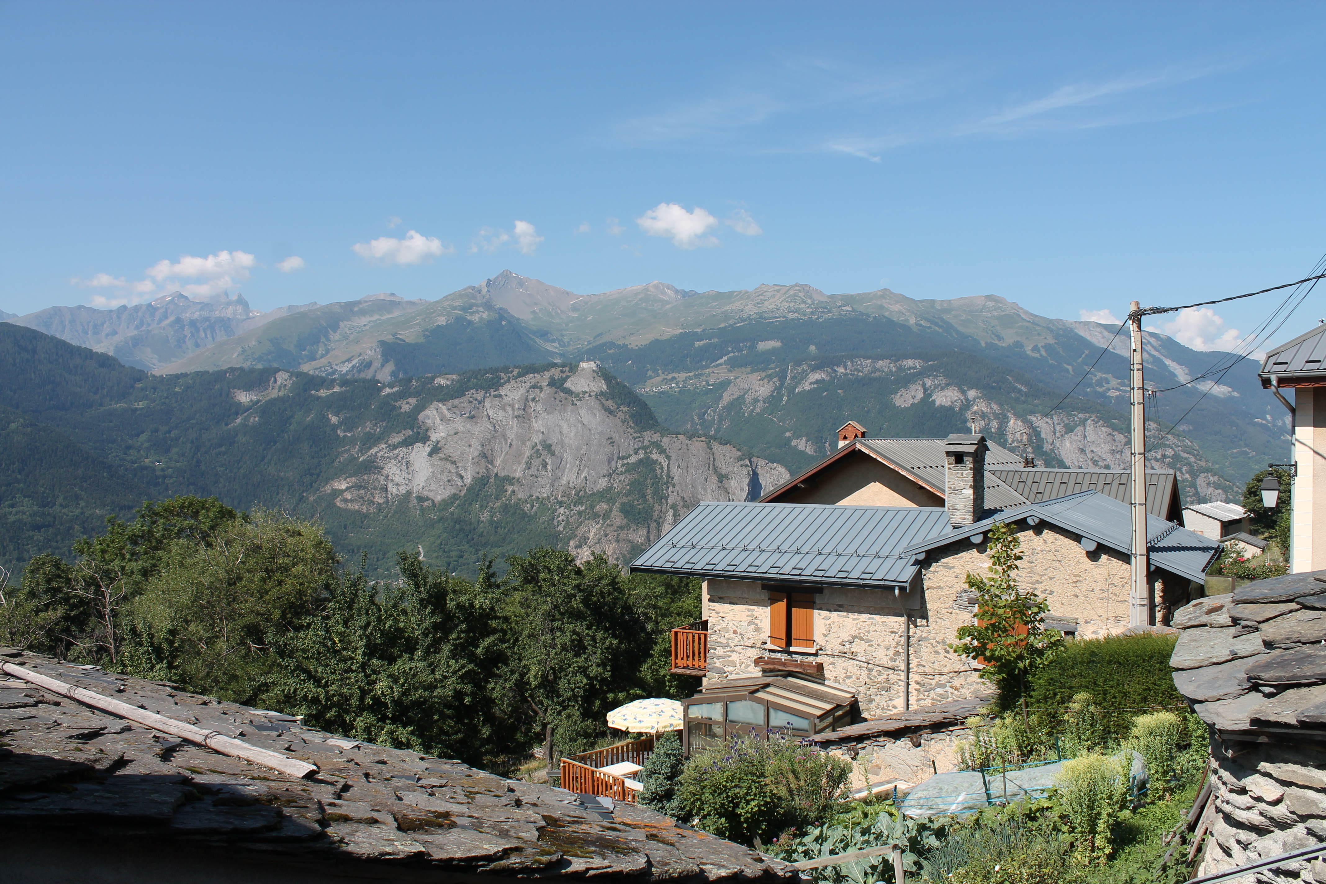 Toits et vue depuis le village du Thyl (août 2018).